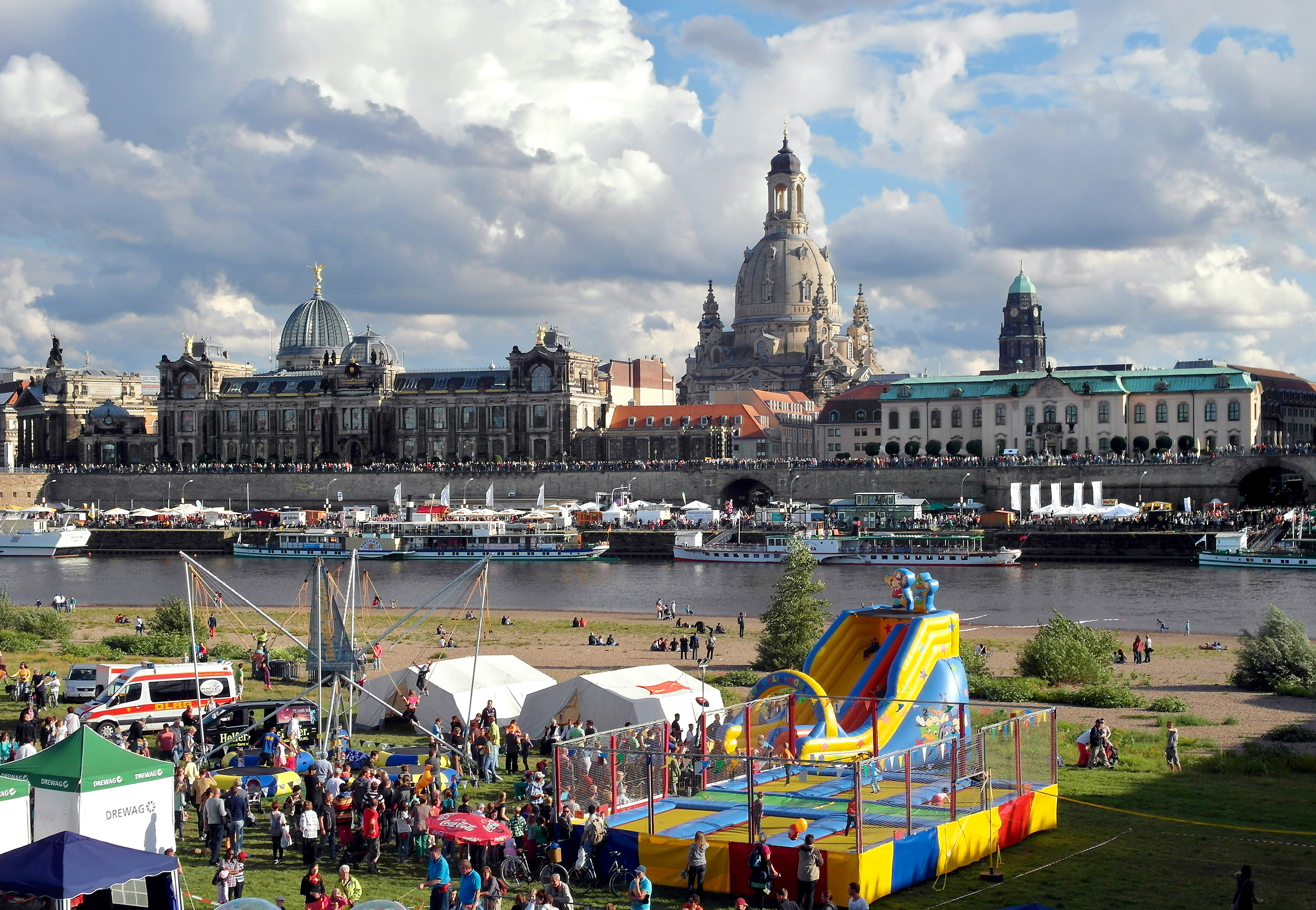 16.08.2014 Dresdner Stadtfest. Blick vom den Rummel am Königsufer über die Elbe zur Brühlschen Terrasse mit Kunstakademie, Münzgasse, Sekundogenitur. Davor die Weiße Flotte vor Anker. Alles überragt von der Frauenkirche. [SAM5409.JPG]20140816045DR. JPG(c)Blobelt.